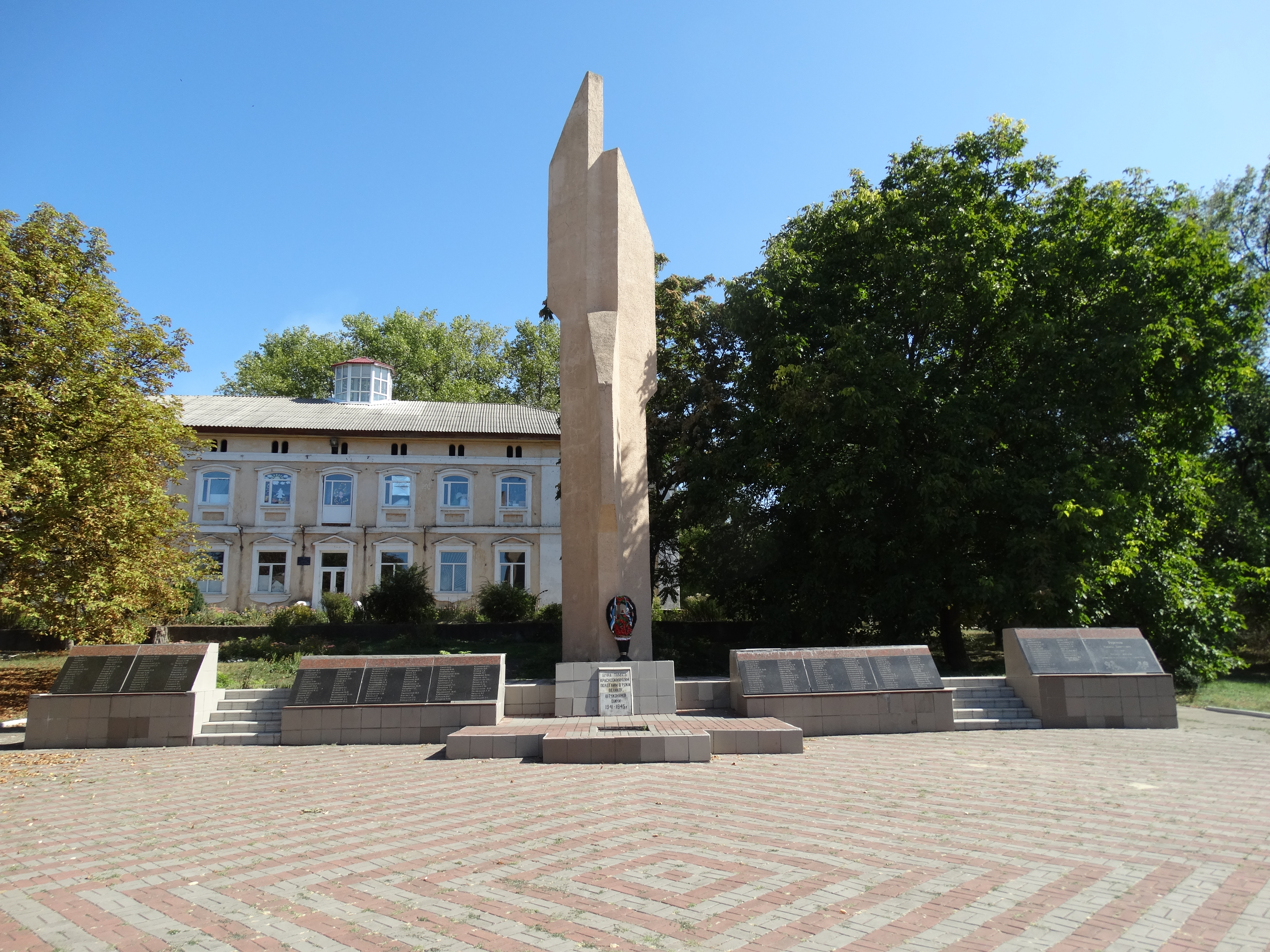 Вікіекспедиція на північ Одещини